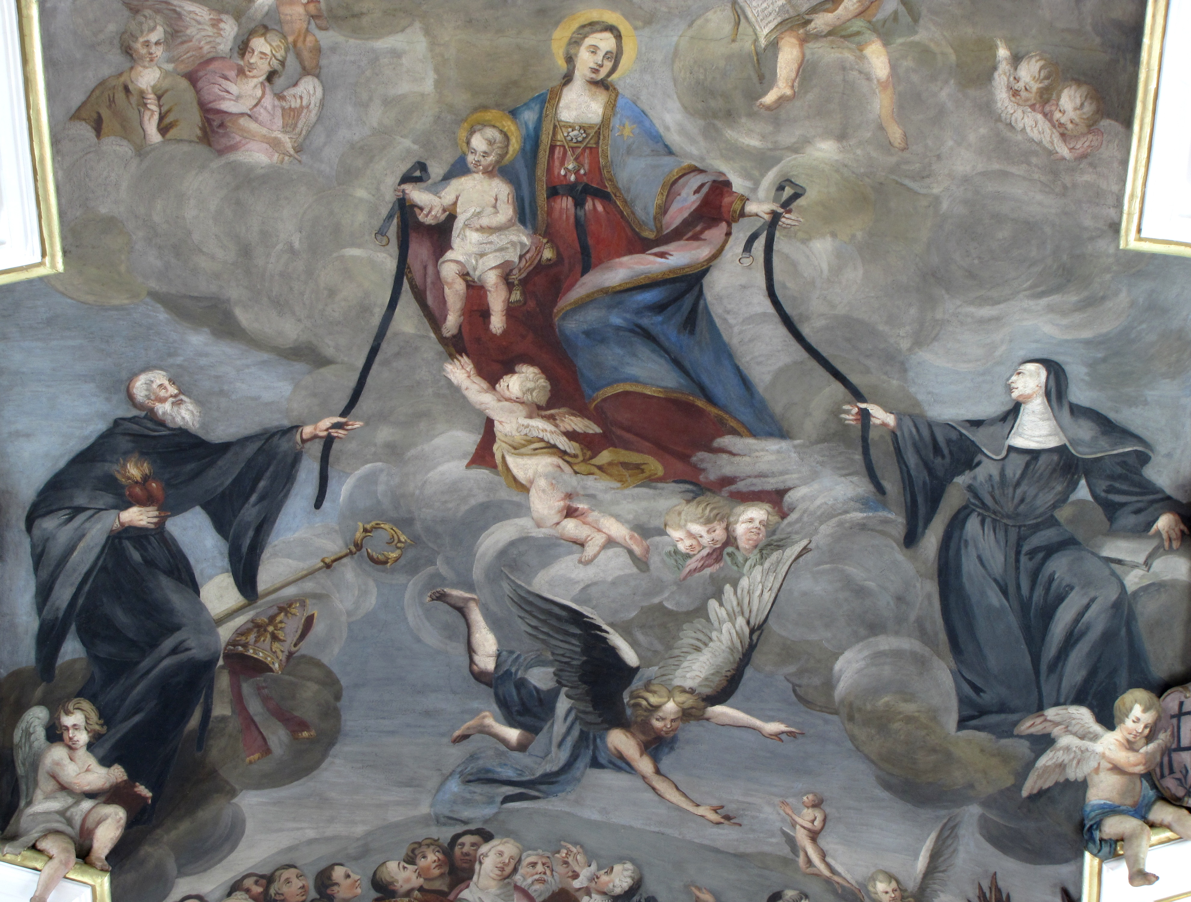 Alsace, Haut-Rhin, Ribeauvillé, Église du Couvent des Augustins (XIVe-XVe-XVIIIe), 3 rue de l'Abbé-Louis-Kremp. (PA00085586, IA68006914).Peinture monumentale "Remise de la ceinture noire à Saint-Augustin et Sainte-Monique par la Vierge et par l'Enfant" (XVIIIe)